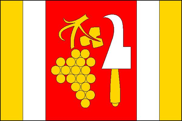 Vlajka obce Neslovice